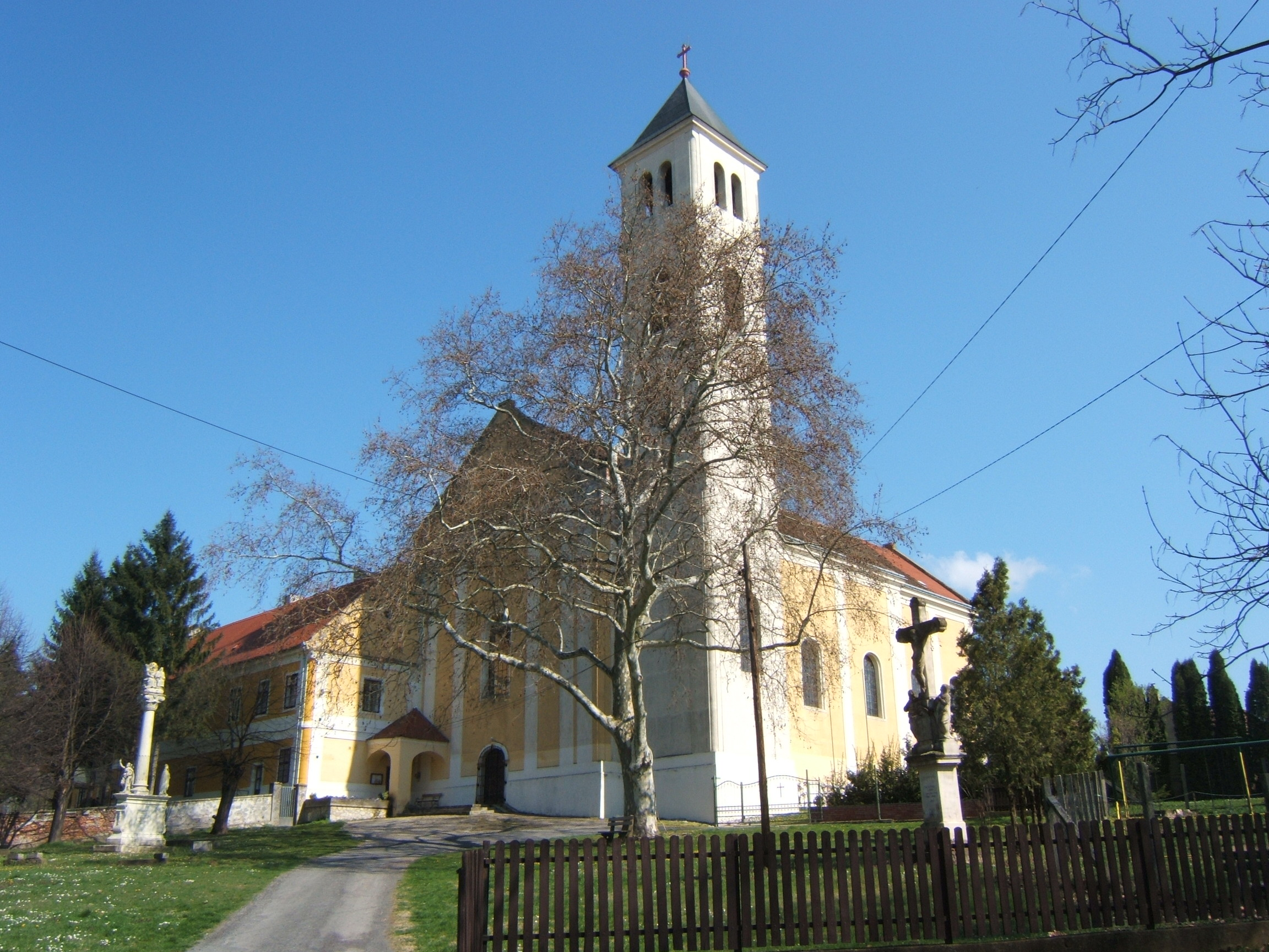 Római katolikus templom, volt ferences templom, Barokk, 18. sz. Újjáépítve 1946-1948-ban. azonosító: 8066 (törzsszám: 4555)- Somogy m., Segesd, Felsősegesd, József Attila utca